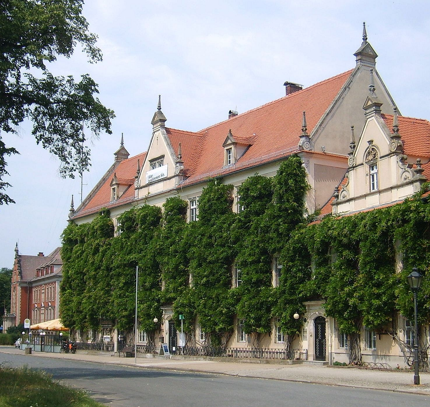 Das Rathaus der Stadt Riesa.